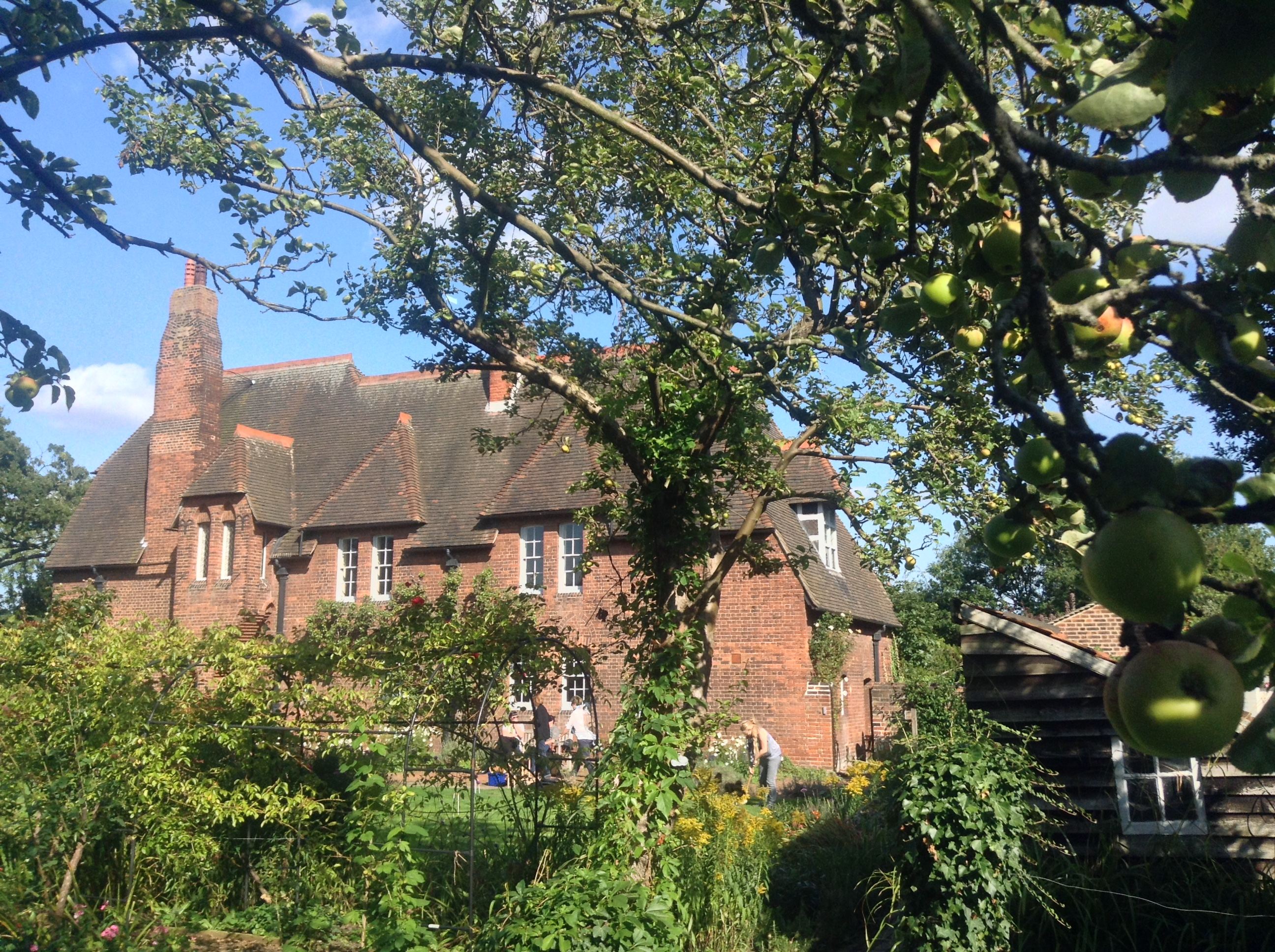 Y Tŷ Coch yn 2015